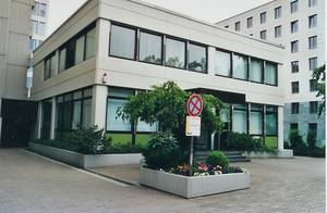 DGU-Museum